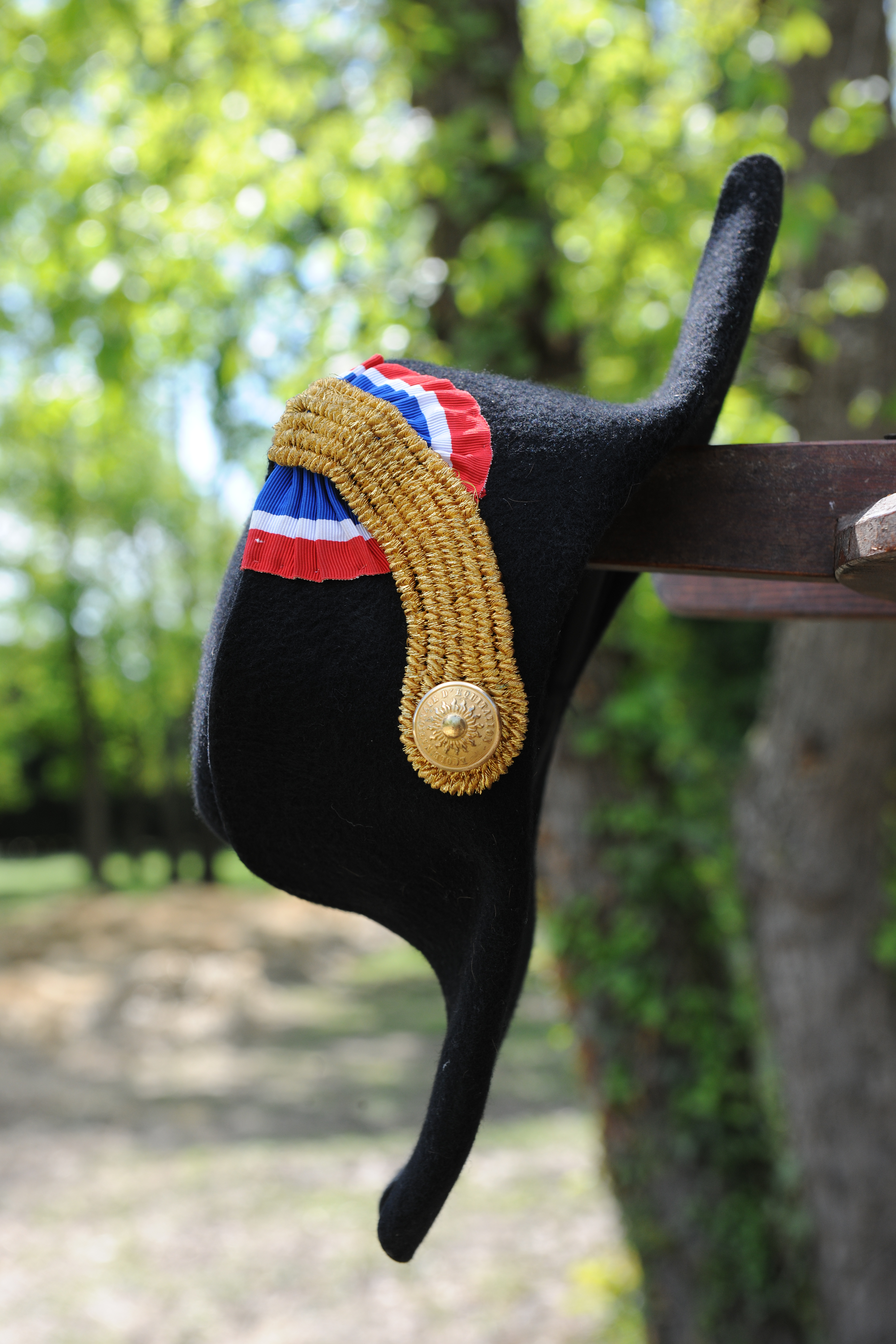 Lampion de la tenue des écuyers du Cadre noir.